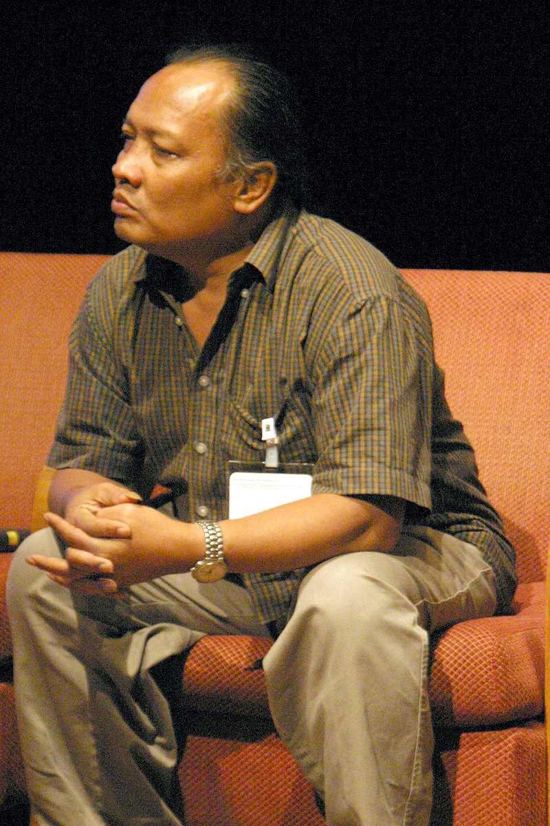 Rahayu Supanggah in I la Galigo Forum, Esplanade, Singapore 13 March 2004